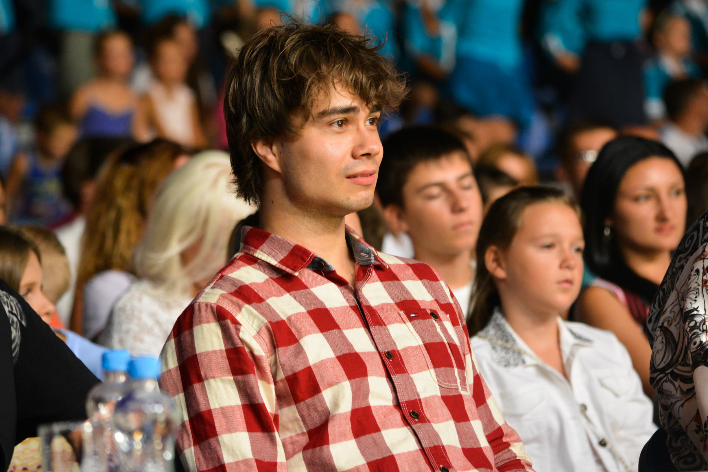 Александр Рыбак в жюри на Детской Новой волне 2015